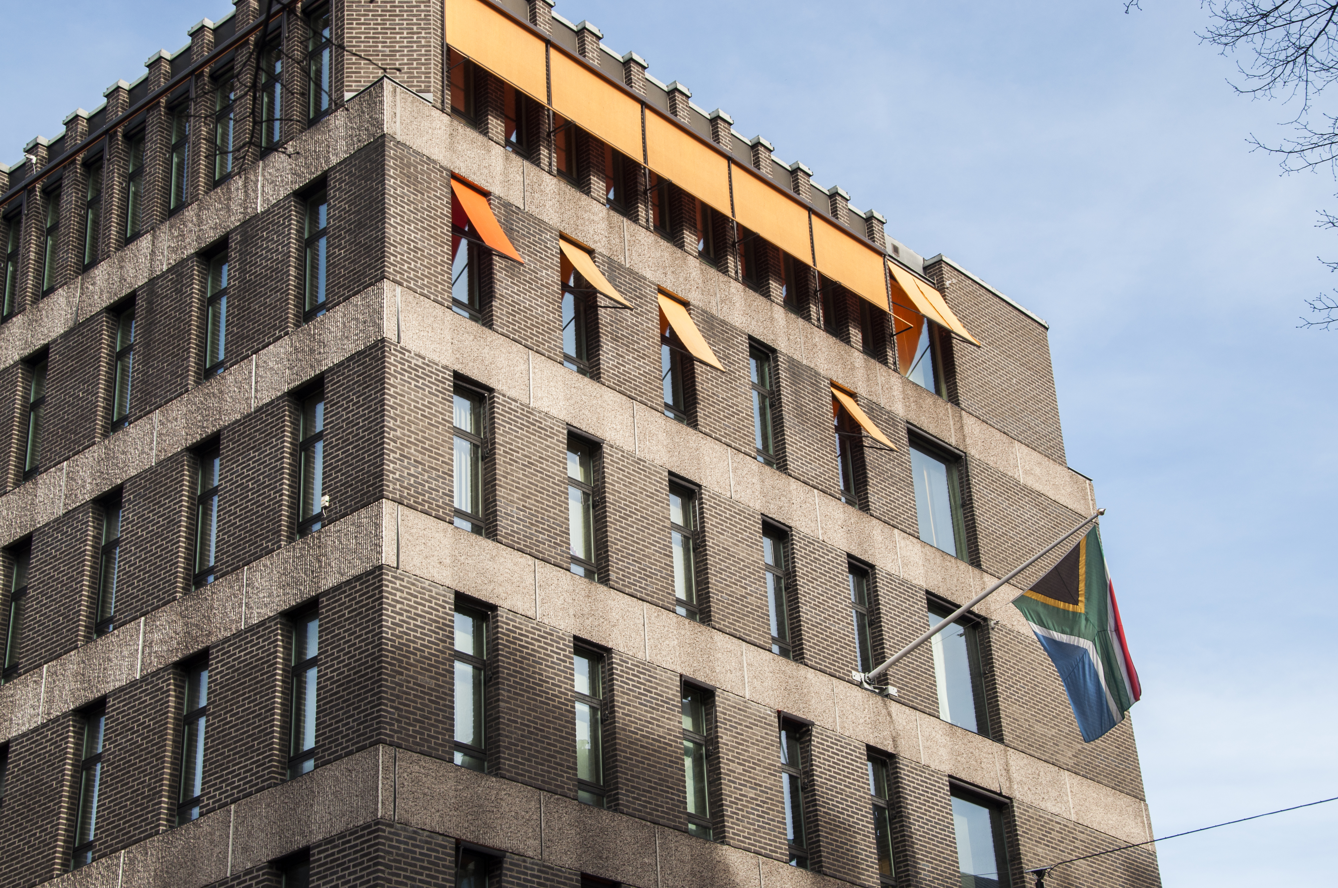 Sydafrikanska ambassaden i Stockholm